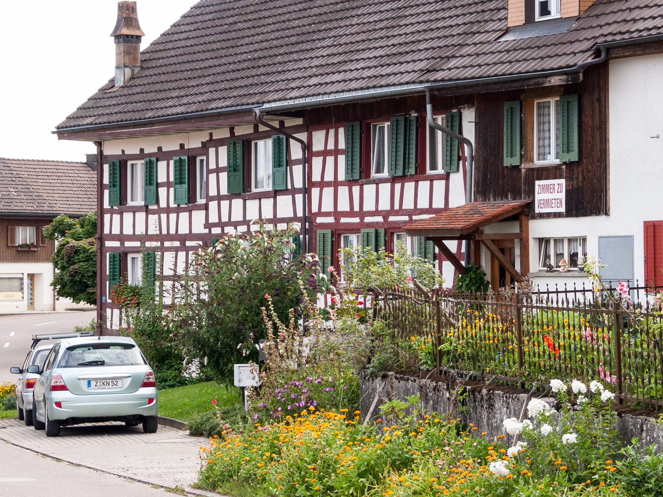 Riegelhäuser an der Dorfstrasse in Wäldi TG